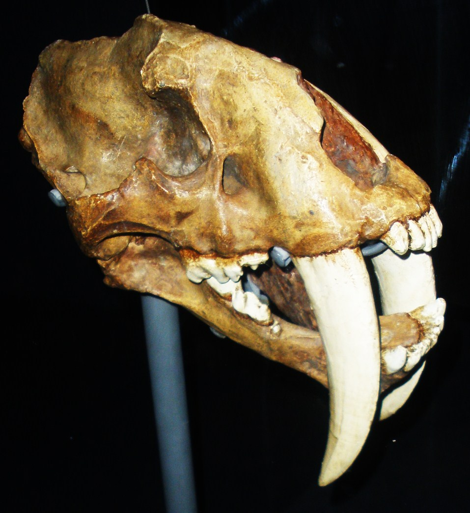 Fossil of Smilodon, an extinct mammal-- Took the photo at Natural History Museum, London